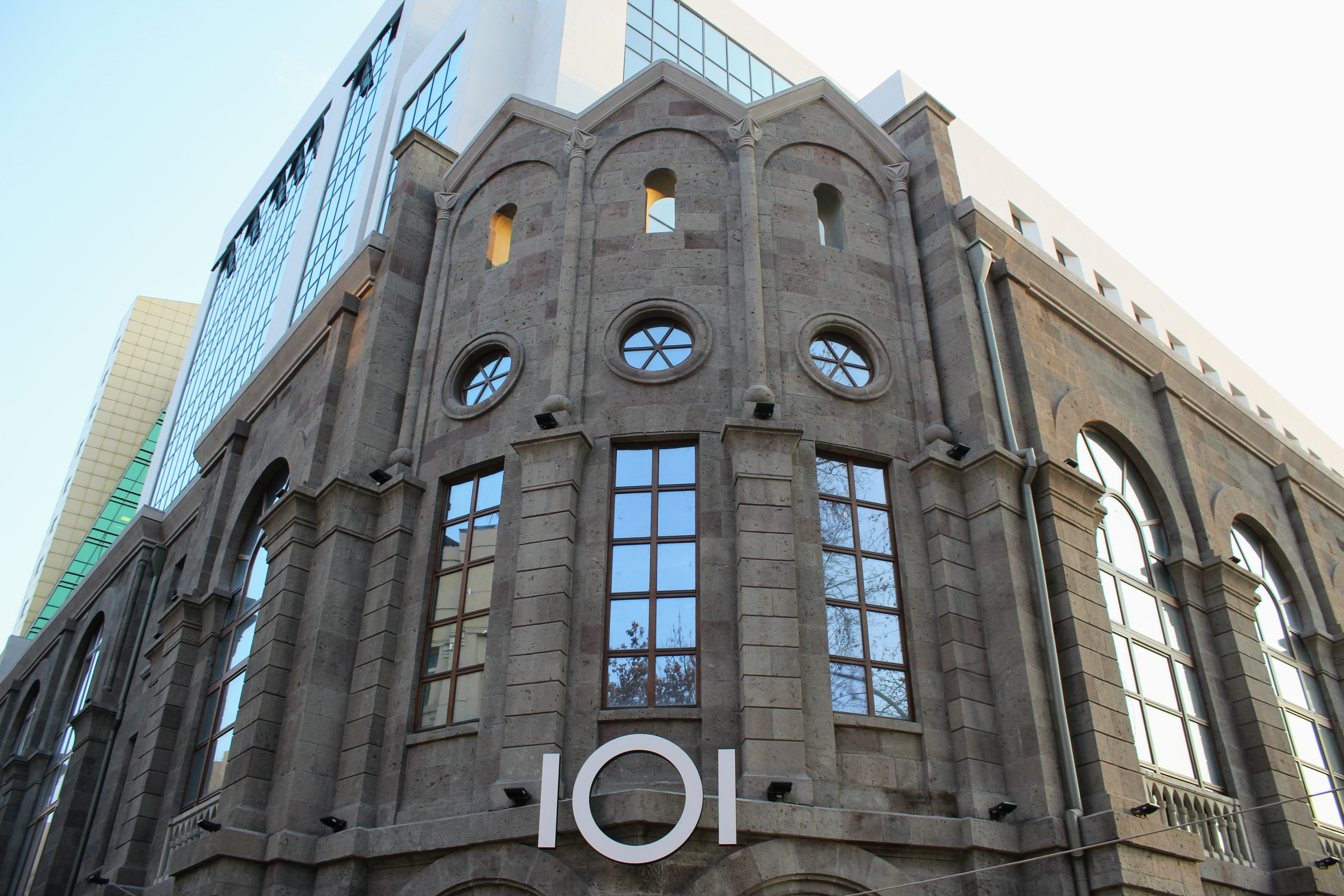 Գյուղատնտեսական բանկի շենք, 2018 թվական